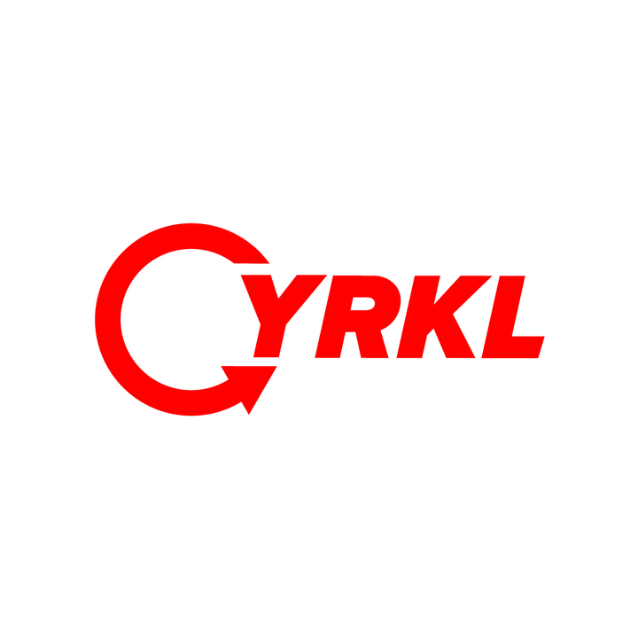 Logo společnosti Cyrkl, Zdrojová platforma (Digitální odpadové tržiště)